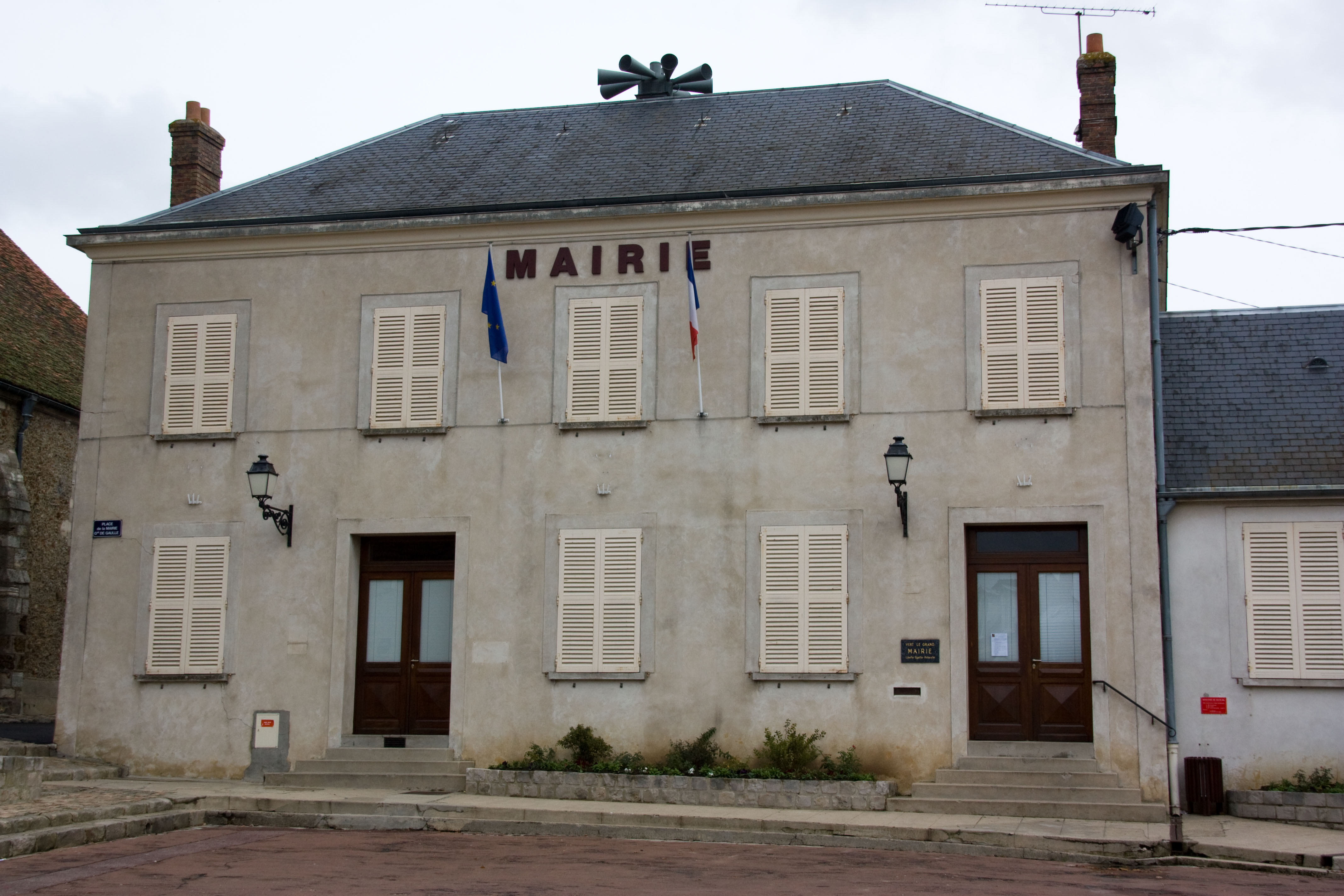 Mairie de Vert-le-Grand, Vert-le-Grand, Essonne, France